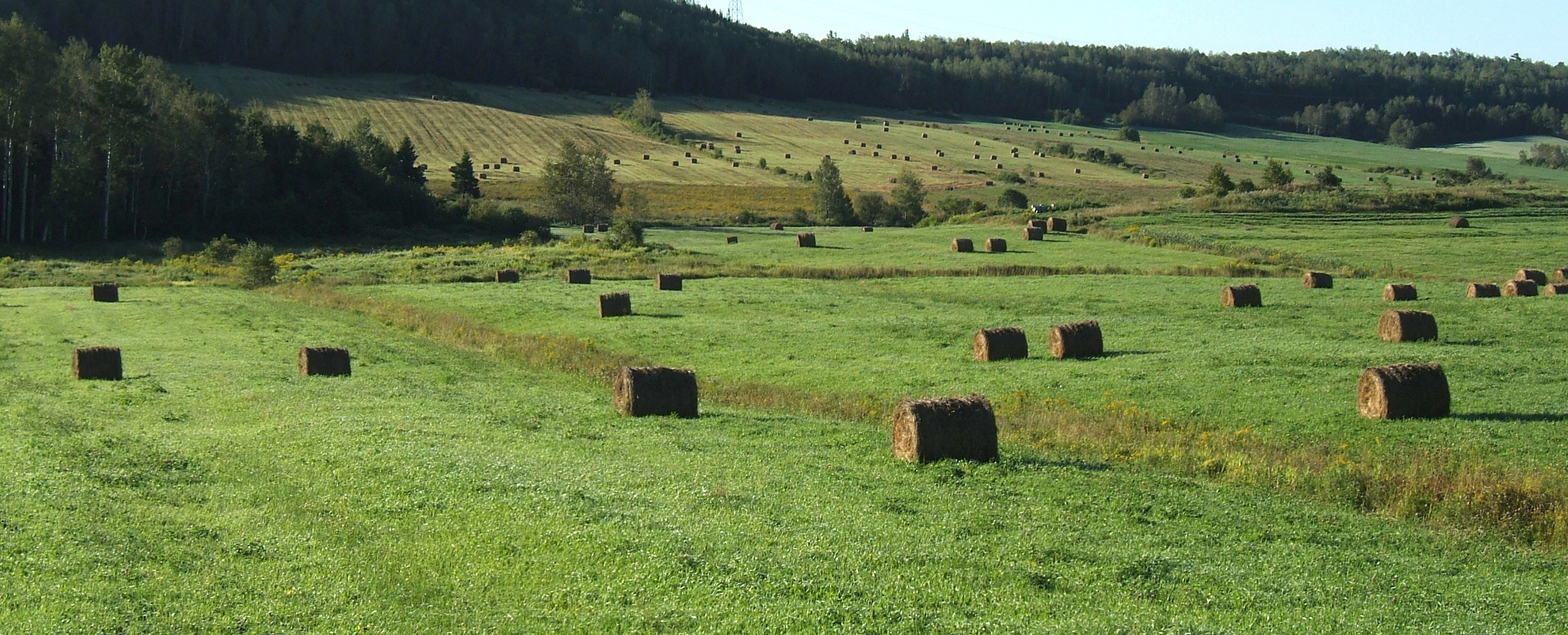 Paysage agricole de Saint-Modeste (Québec, Canada). Auteur : Nicolas Gagnon, septembre 2006.